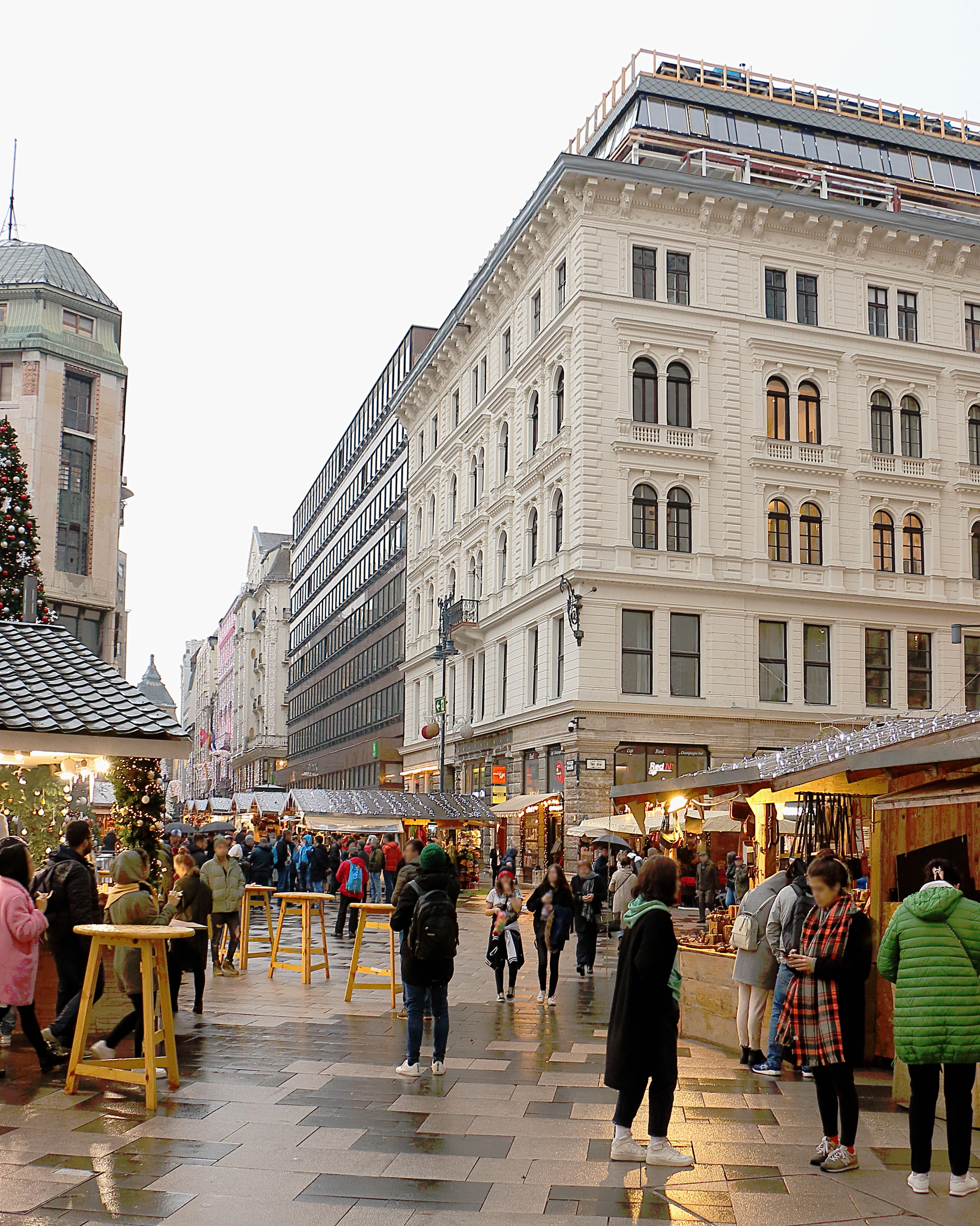 Vörösmarty tér 2. és a 2019-es karácsonyi vásár a Deák Ferenc utca felé